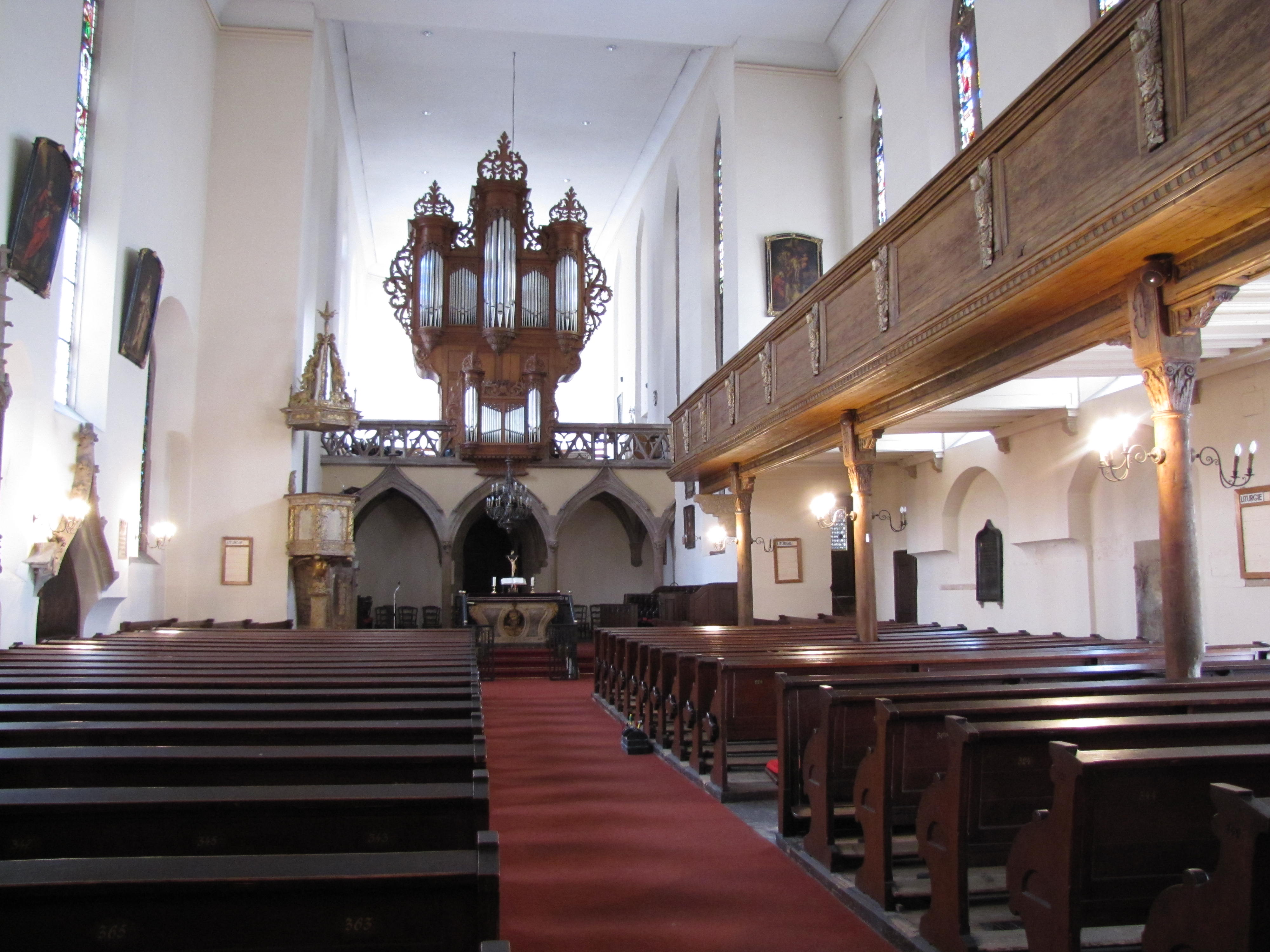 Alsace, Bas-Rhin, Église protestante Saint-Guillaume de Strasbourg (PA00085026): Vue intérieure de la nef vers le chœur.Orgue André Silbermann (1728): This object is classé Monument Historique in the base Palissy, database of the French furniture patrimony of the French ministry of culture, under the references PM67000973 and buffet PM67000404 buffet.